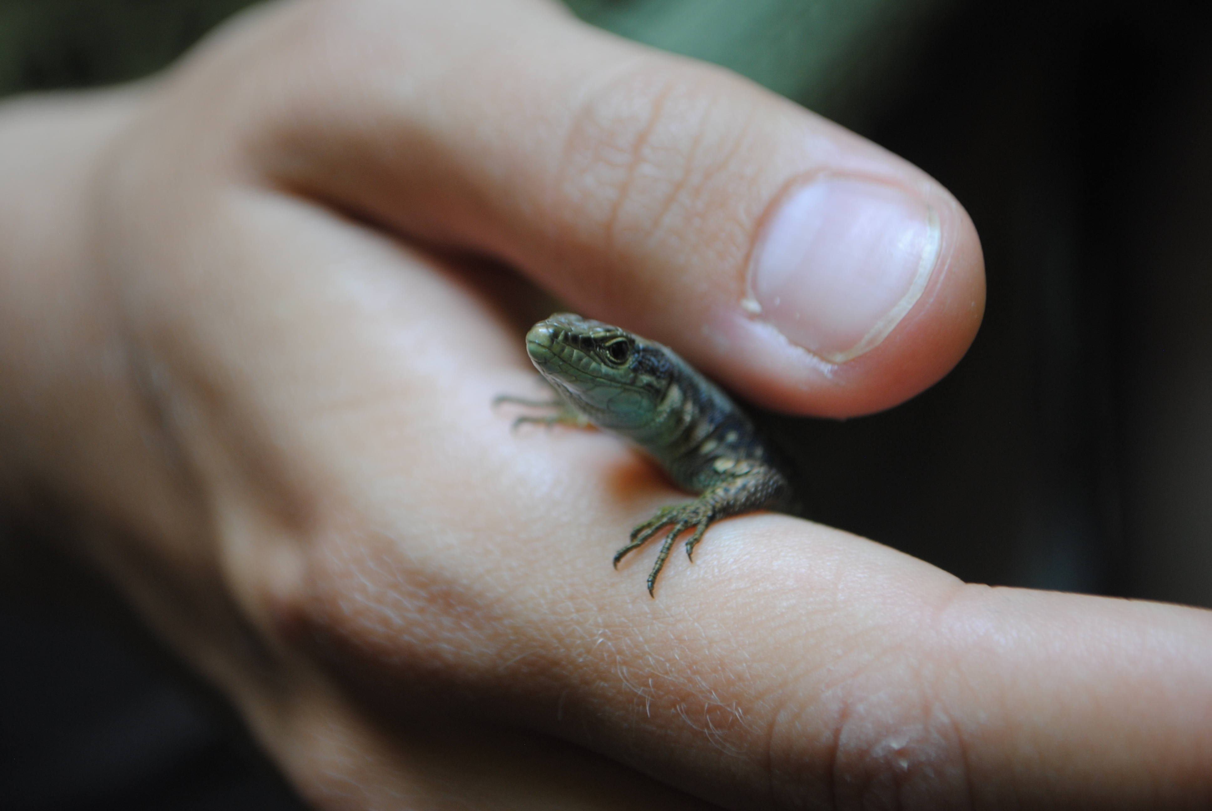 Lizard of Genus Darevskia, spotted in the end of August 2016 in Shikahogh State Reserve.